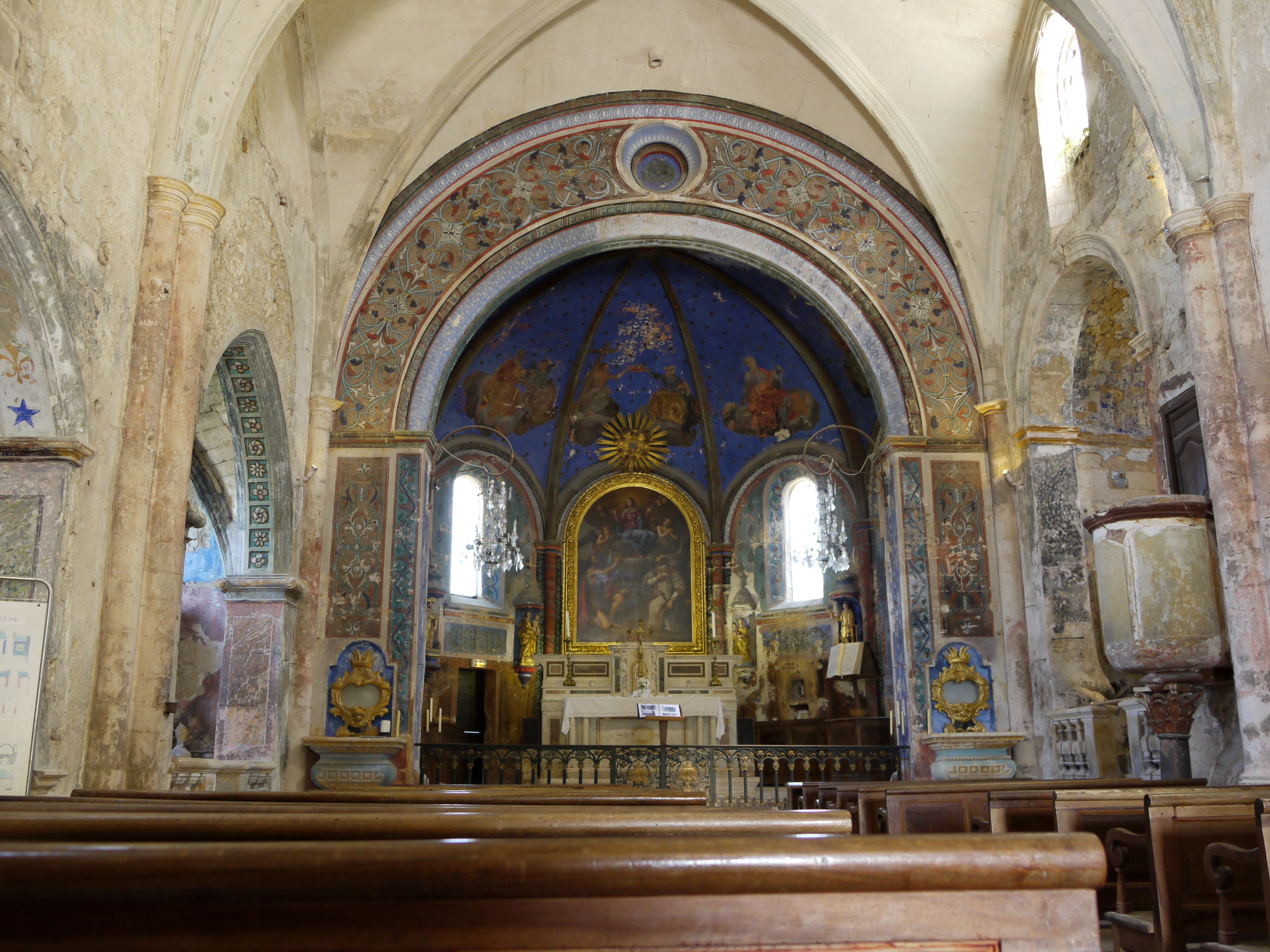 Église médiévale Notre-Dame-d'Alydon d'Oppède, Vaucluse, France